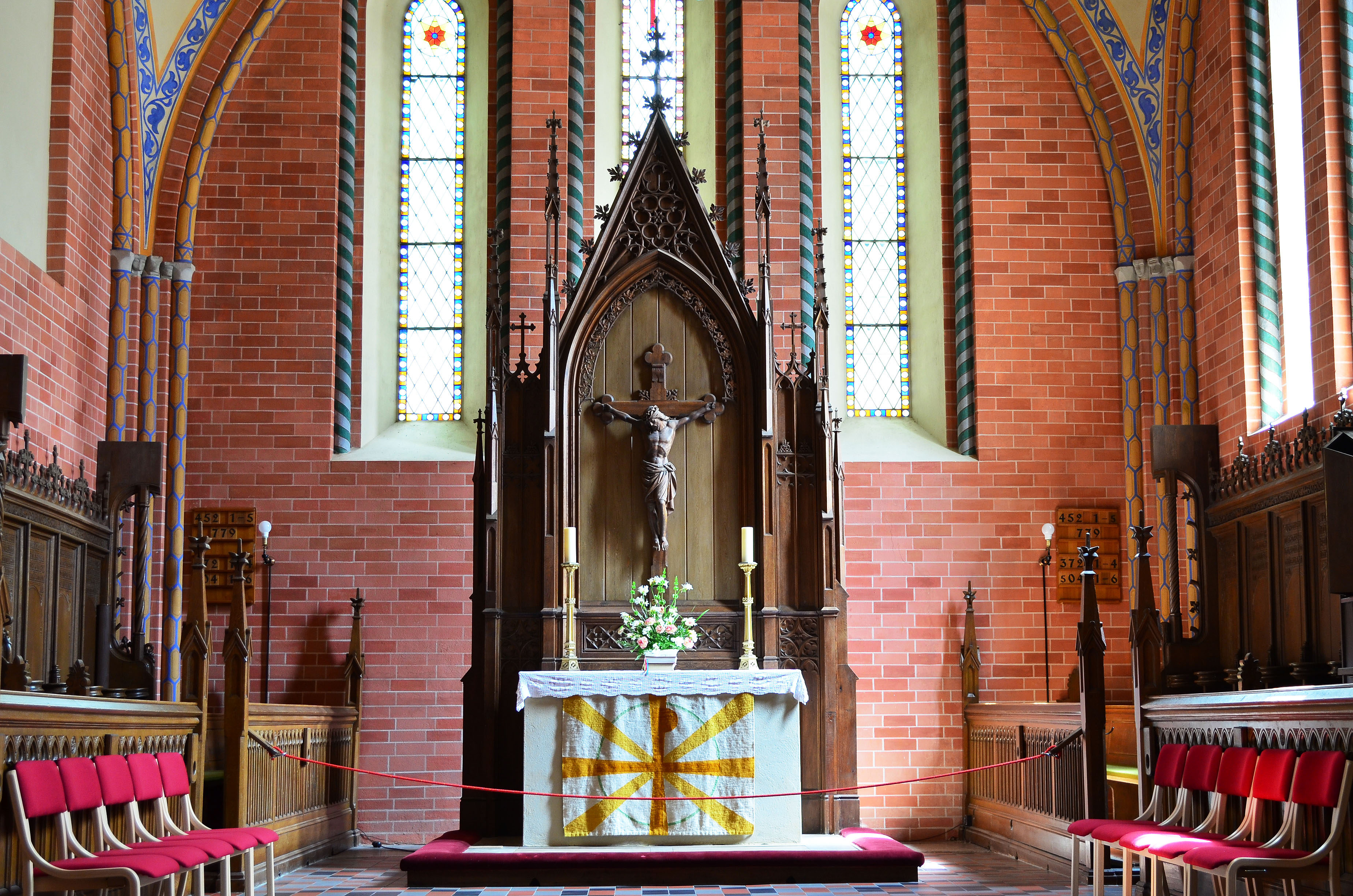 Röbel,_Nicolaikirche,__der_Altar